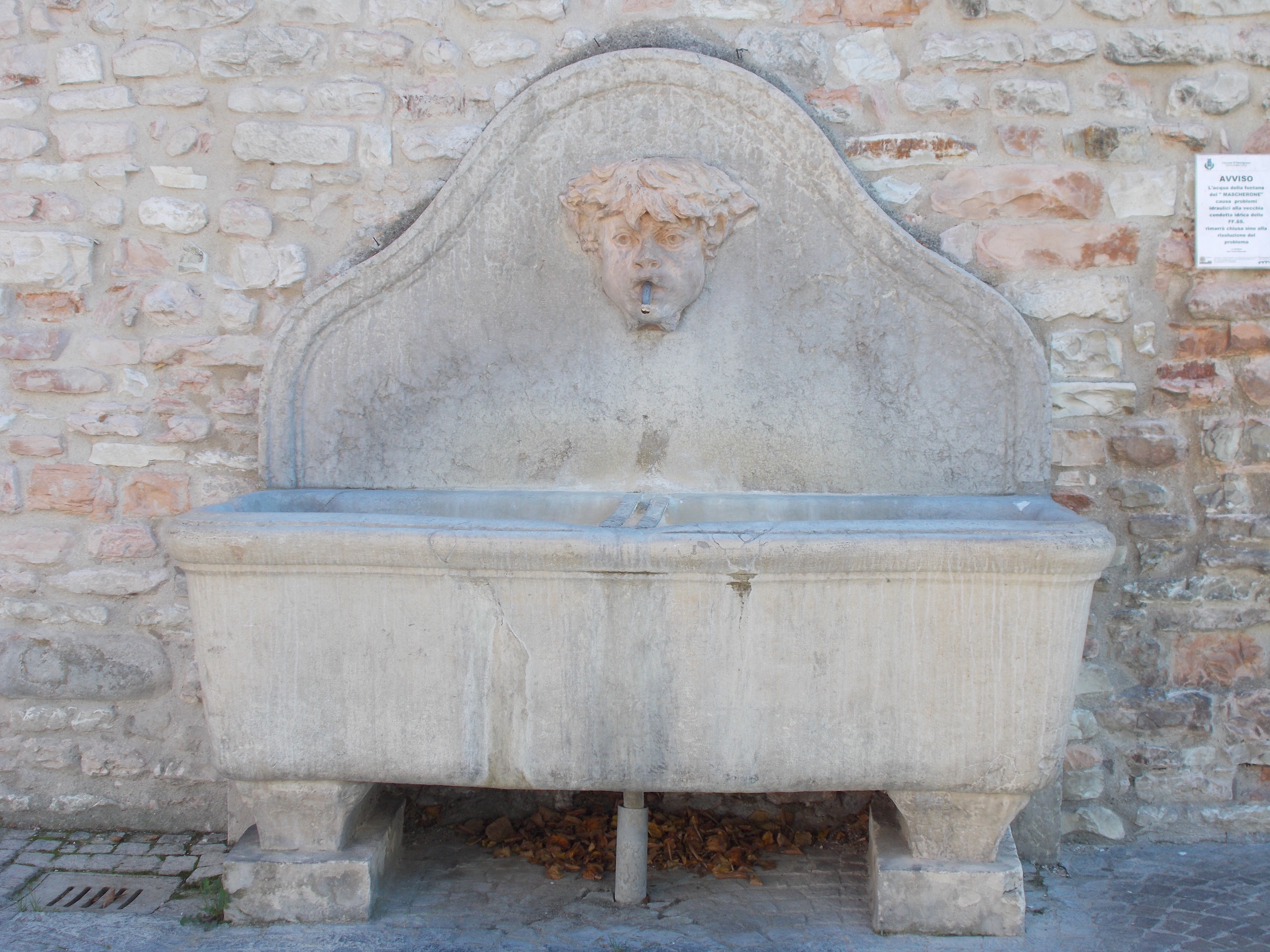 La fontaine du "Mascherone"